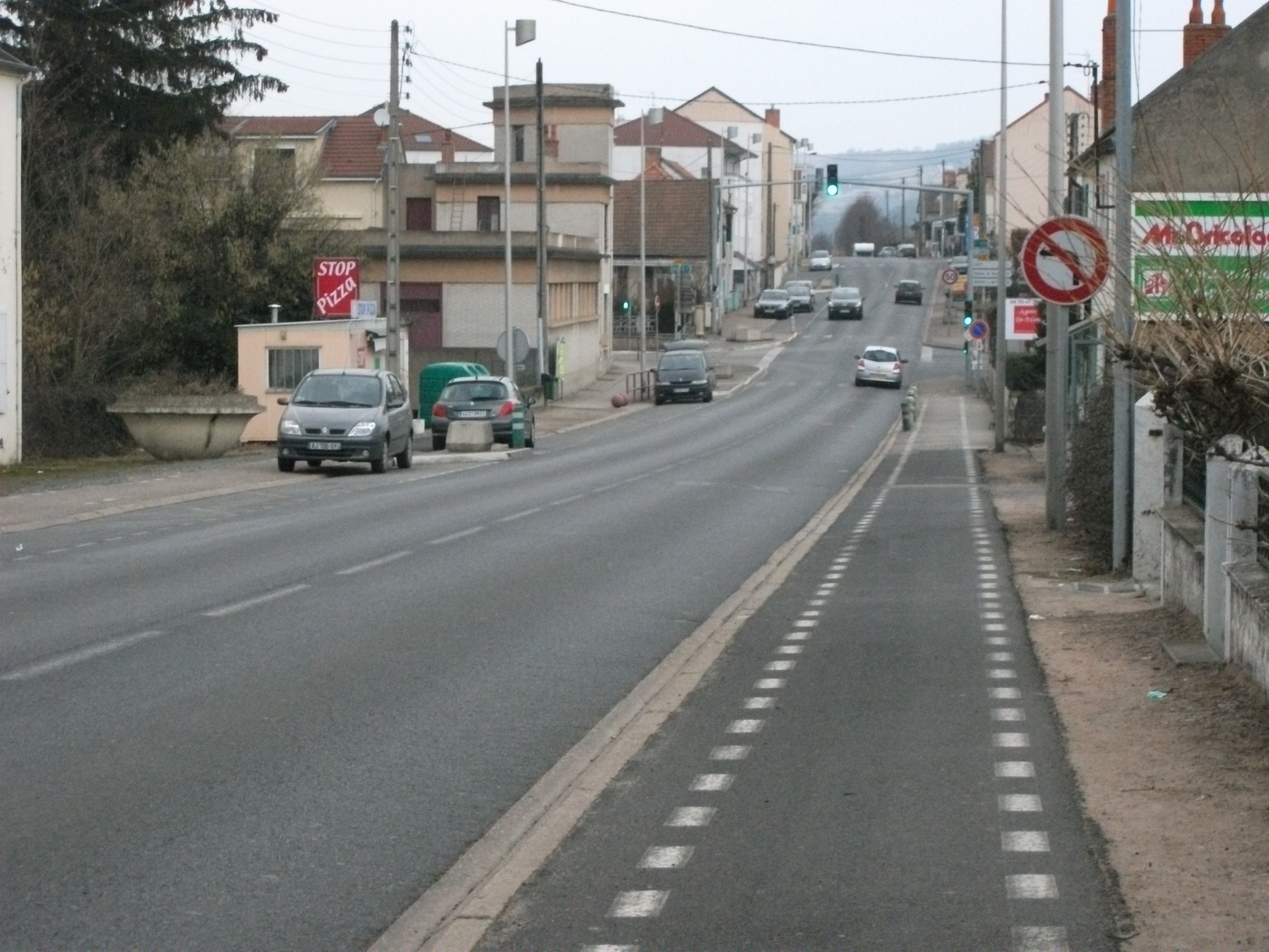 Route départementale 906 en direction de Vichy et Abrest, à Saint-Yorre (Allier).